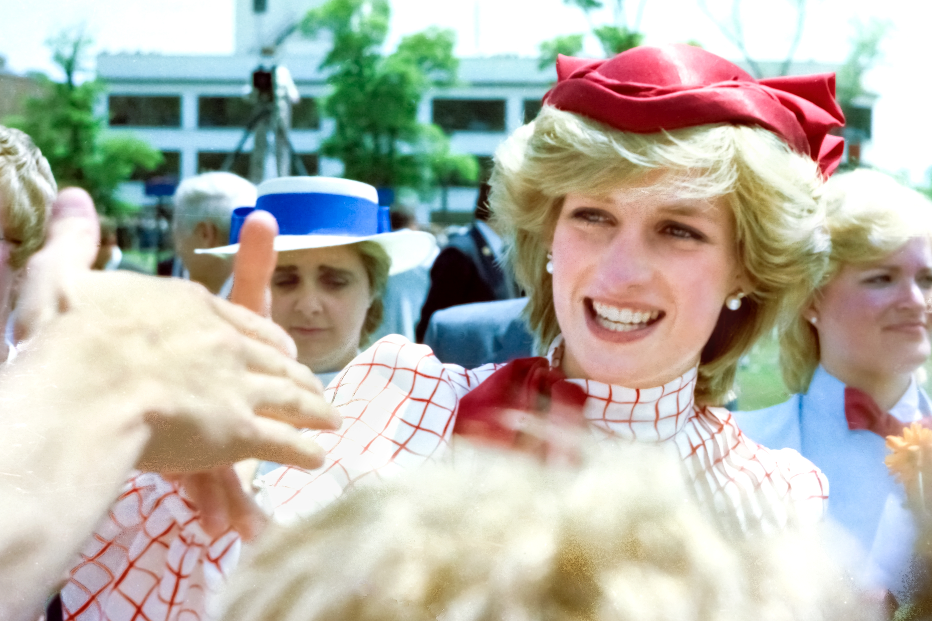 Taken by me.